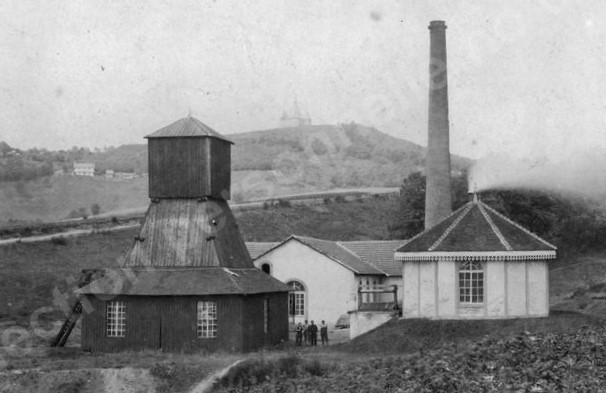 Les anciennes installations du puits Sainte-Marie.Derrière : la chapelle Notre-Dame-du-Haut.